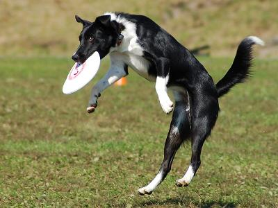 DiscDogAlpha